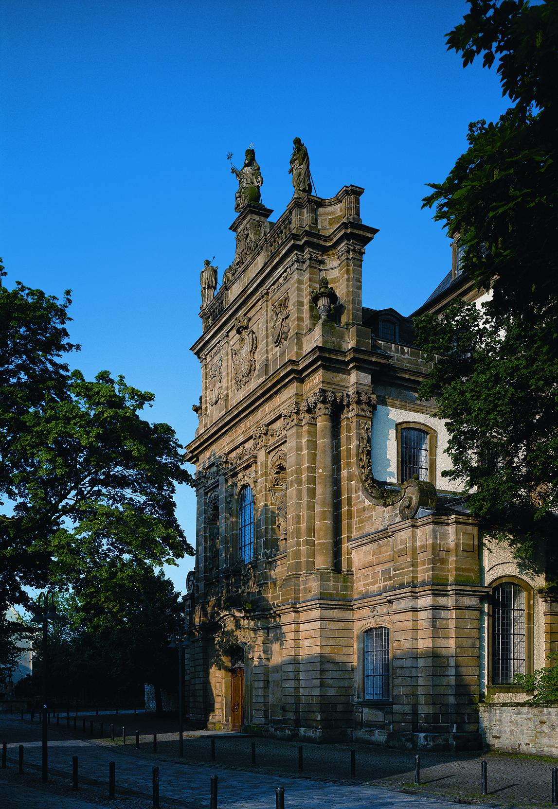 Ansicht der Immaculata-Kirche in Büren von Nordosten freundlicherweise zur Verfügung gestellt von Hr. Altemeier, Tourismusbeauftragter der Stadt Büren, Veröffentlichung unter GNU-FDL zugestimmt